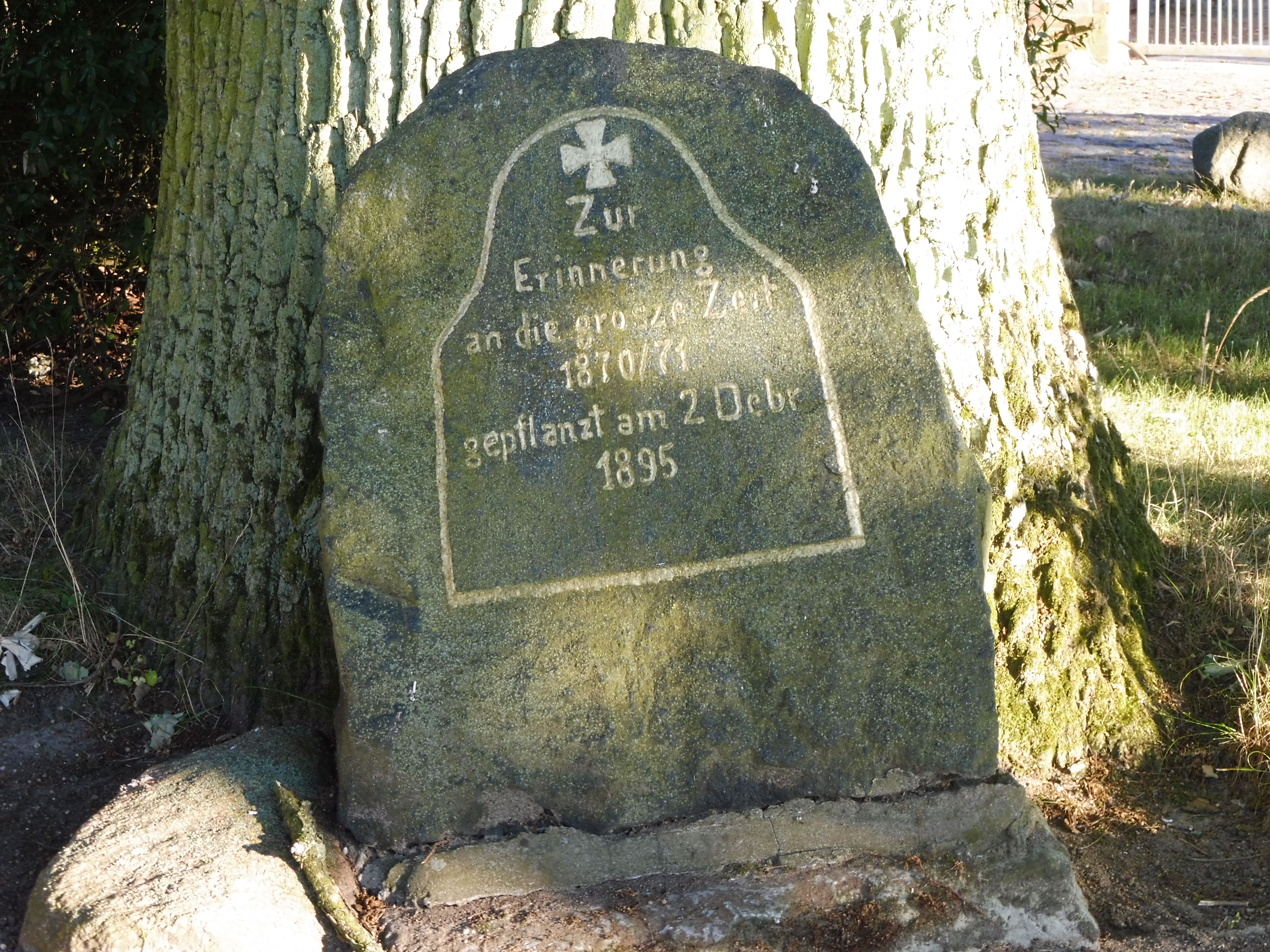 Gedenkstein in Barkow für die Schlacht bei Loigny und Poupry, in der die deutschen Truppen vom Herzog von Mecklenburg befehligt wurden.